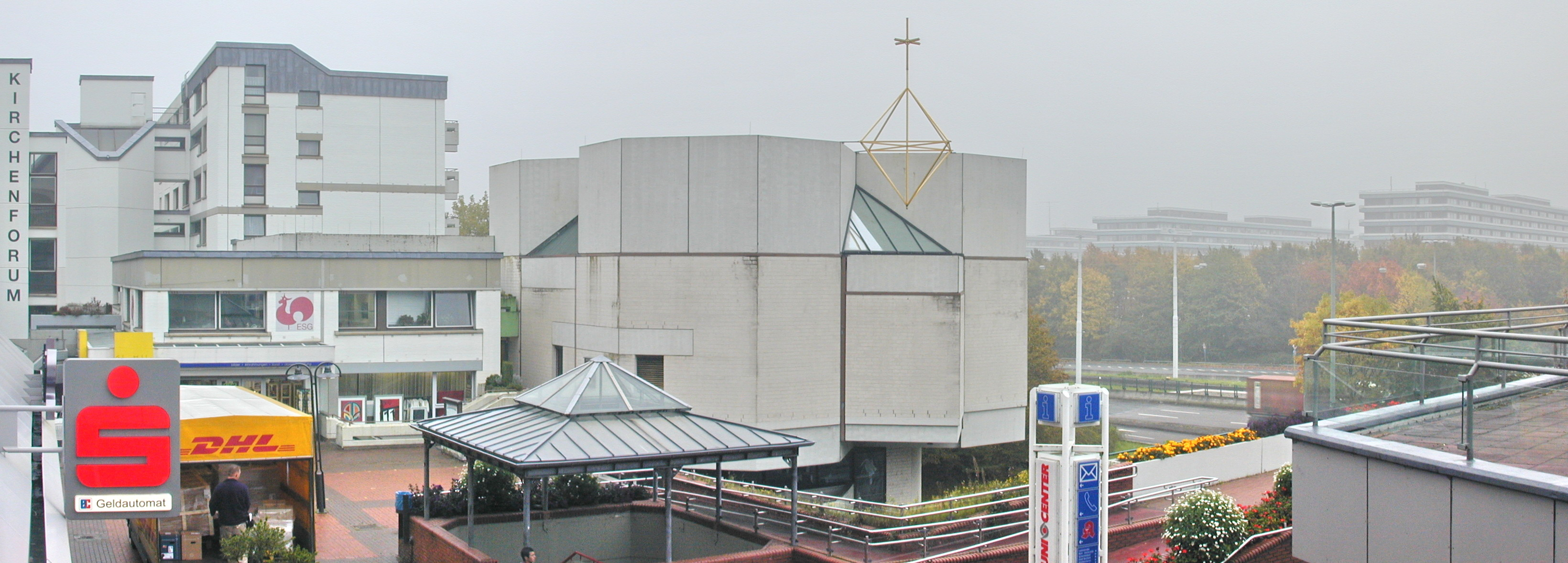 Ev. Apostelkirche Bochum an der Ruhruniversität mit der Kath. Kirche St. Augustinus im Untergeschoß